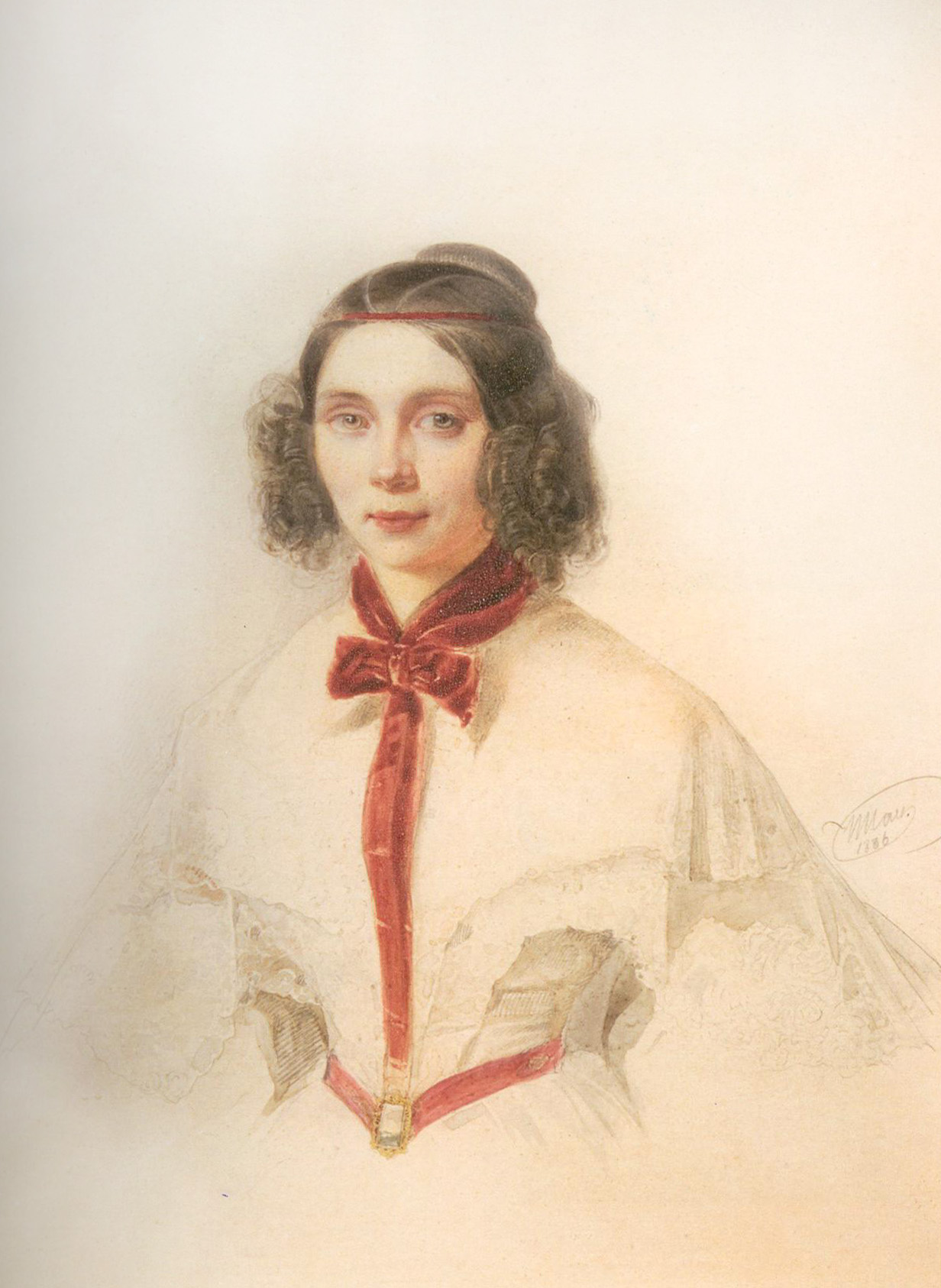 Мария Сергеевна Оленина, ур. Львова (1810-1899), дочь С.Д.Львова и Т.П.Полторацкой. В январе 1831 года вышла замуж за полковника Петра Алексеевича Оленина (1794-1868), старшего брата А.А.Олениной.